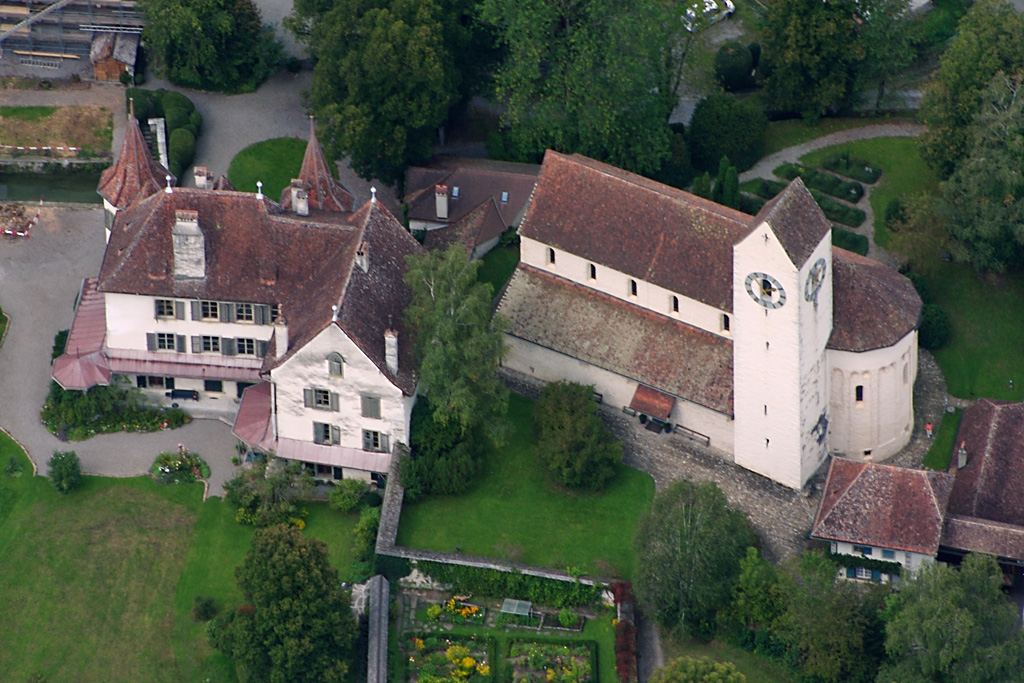 Schloss und Kirche Amsoldingen, Schweiz